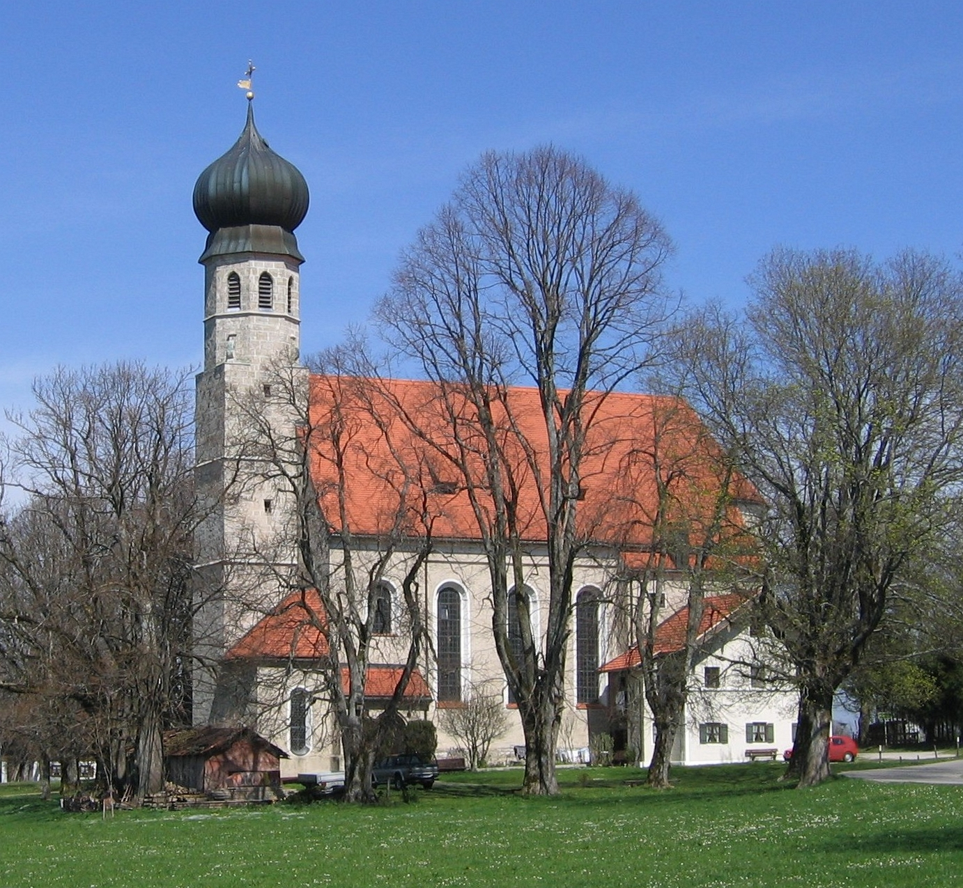 Allerheiligenkirche in Warngau, Oberbayern